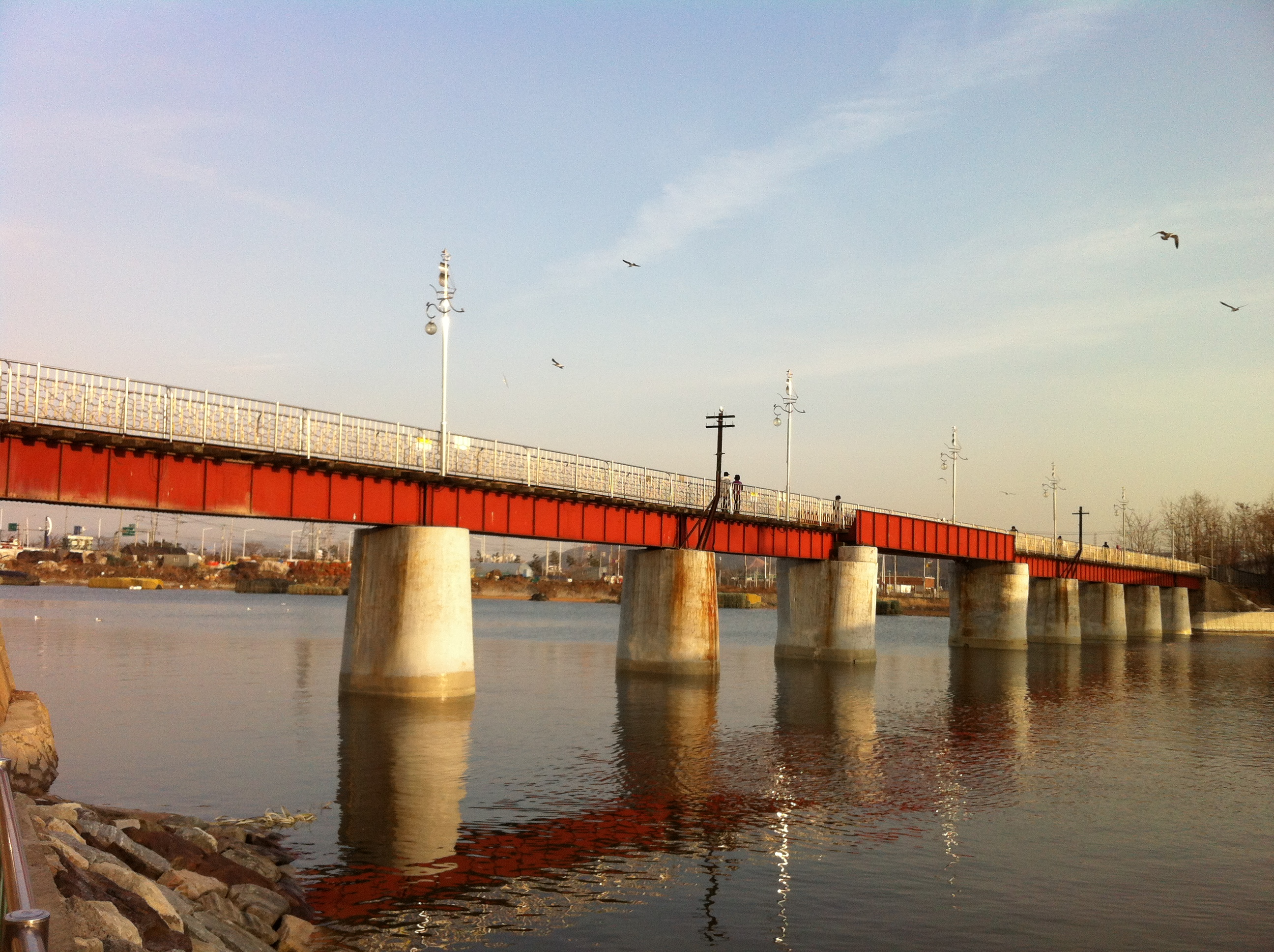 장도포대지에서 월곶방향을 바라보며 찍은 것.